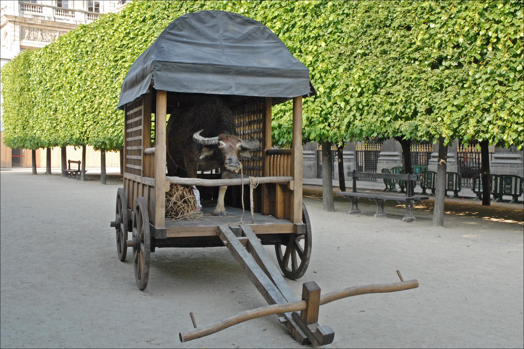 "Immigrant sans papier" 2006 Installation de Huang Yong Ping dans les jardins du Palais Royal "Huang Yong Ping développe un discours critique sur les cultures occidentales et orientales, ses œuvres mettent souvent en scène le règne animal qui, par sa puissance symbolique, tient une grande place dans la culture chinoise. Dans le jardin du Palais-Royal, il expose un buffle empaillé installé dans une carriole à l’arrêt. Le buffle est la monture traditionnelle du sage chinois Lao-Tseu. Le titre de l’œuvre « Immigrant Sans Papier », évoque selon l’artiste l’idée de n’avoir aucune identité ni aucune voix à faire entendre." extrait de la notice